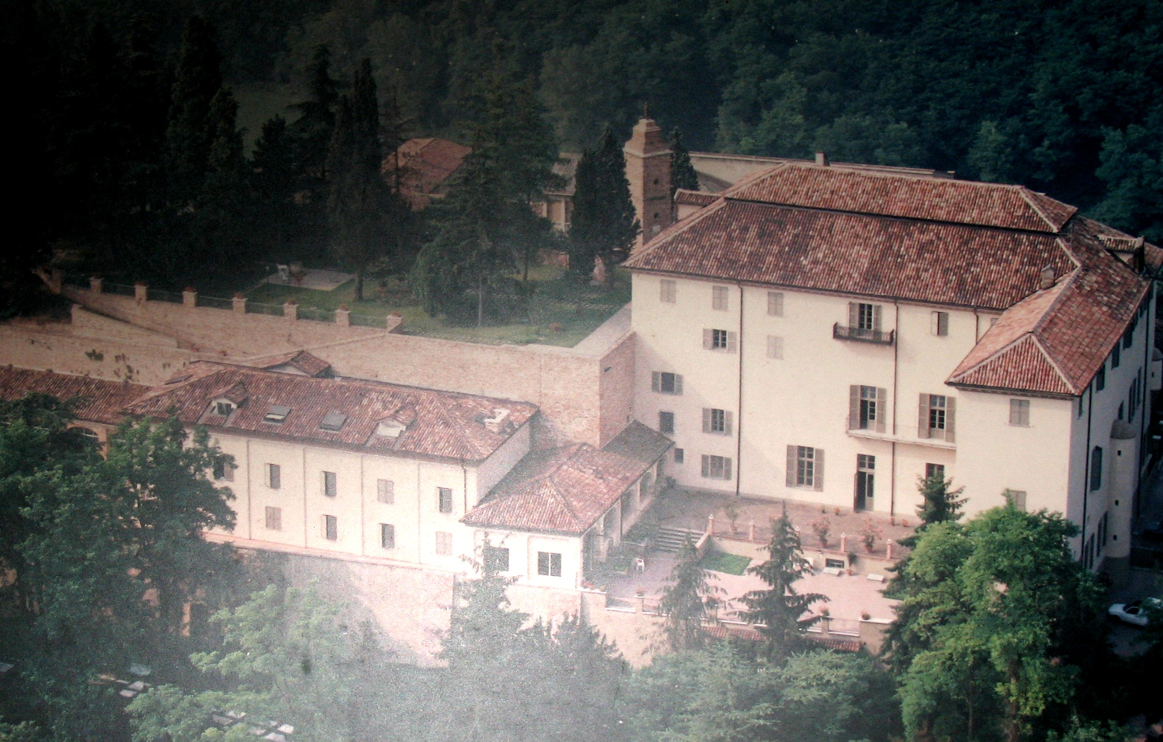 Particolare di un'immagine riproducente il palazzo-castello Cacherana di Bricherasio a Fubine, in provincia di Alessandria, Italia. L'immagine è presente all'interno del palazzo - adibito a casa di riposo dell'Opera "Don Orione" - e ne è stata autorizzata la ripresa.